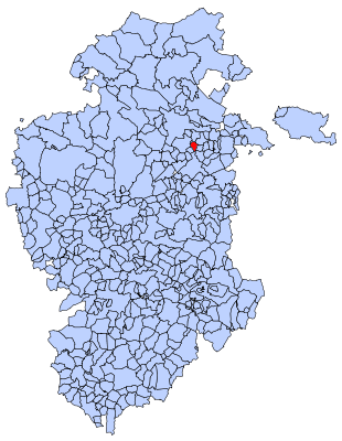 La Vid de Bureba en Burgos